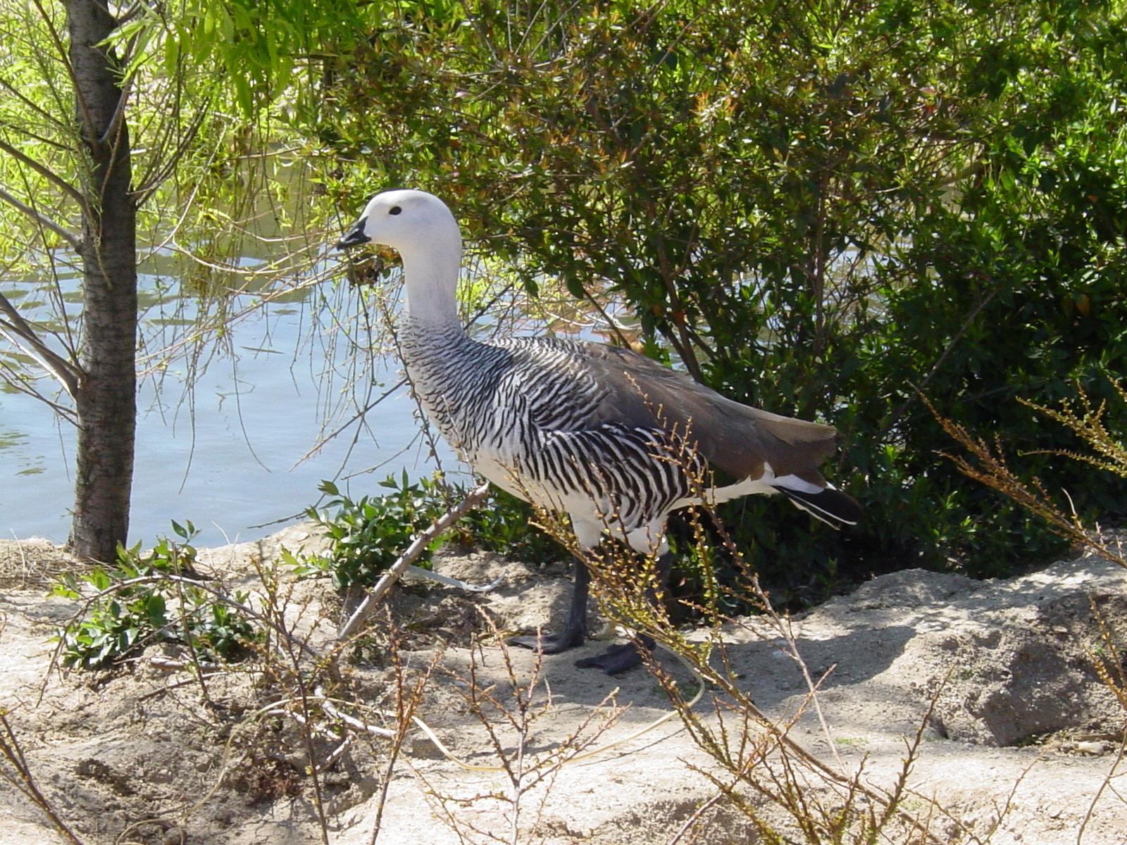 self made.